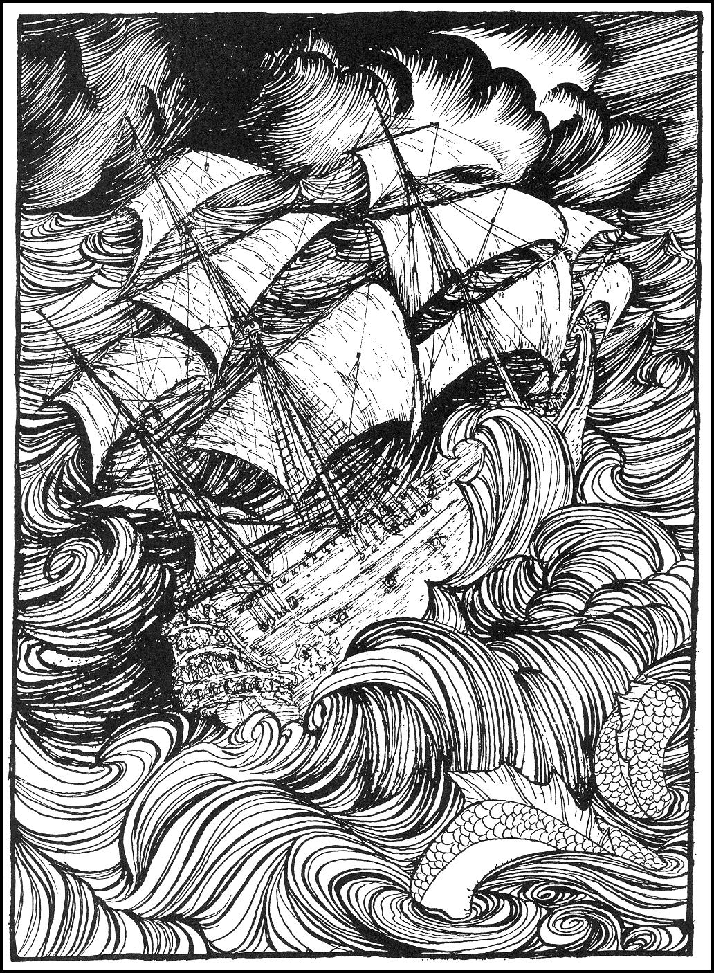 Иллюстрация Артура Рэкхема из книги "Poe's Tales of Mystery and Imagination" к рассказу Эдгара По "Рукопись, найденная в бутылке"